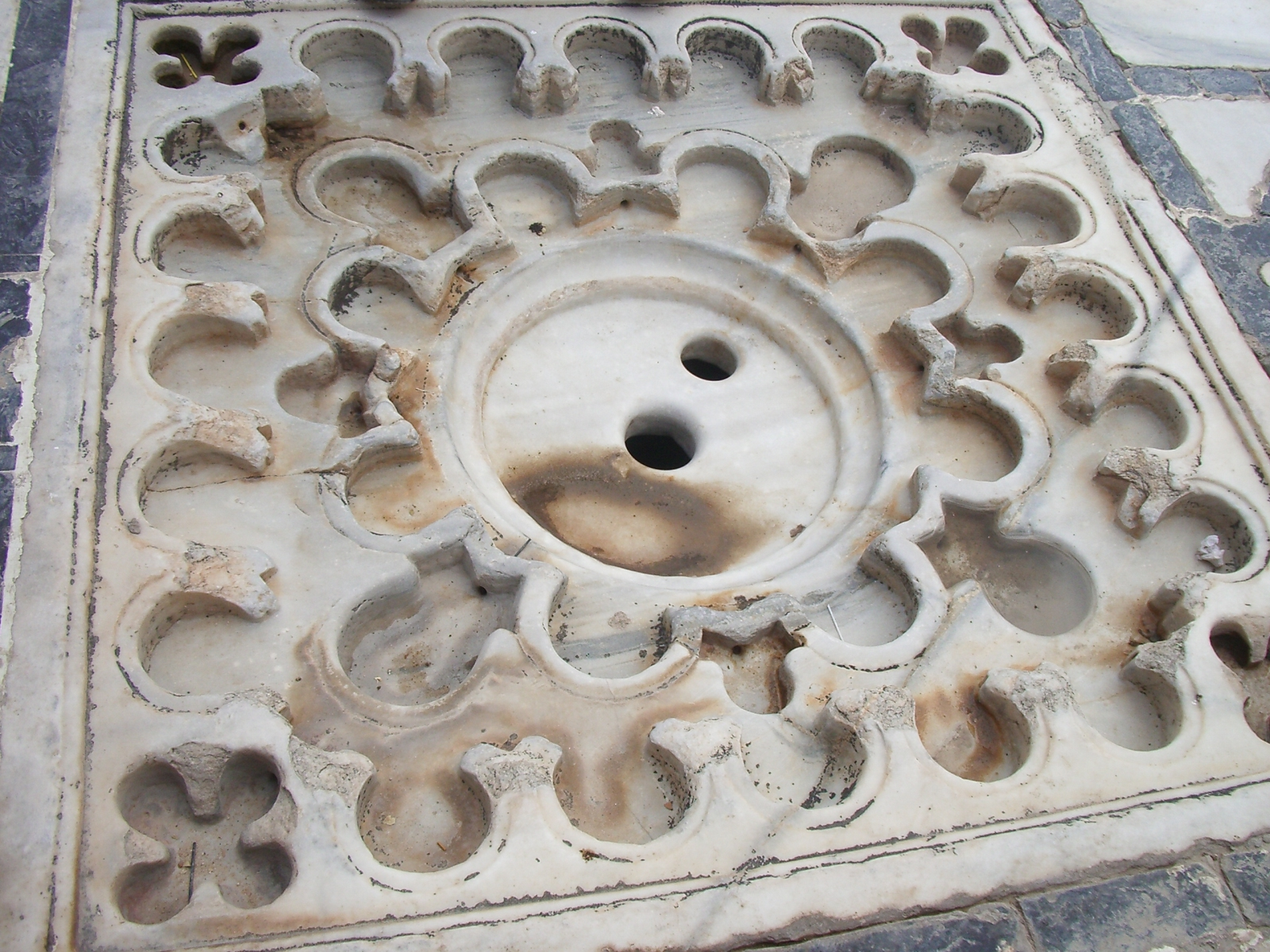 col·lector d'aigua de pluja, Gran Mesquita de Kairuan.